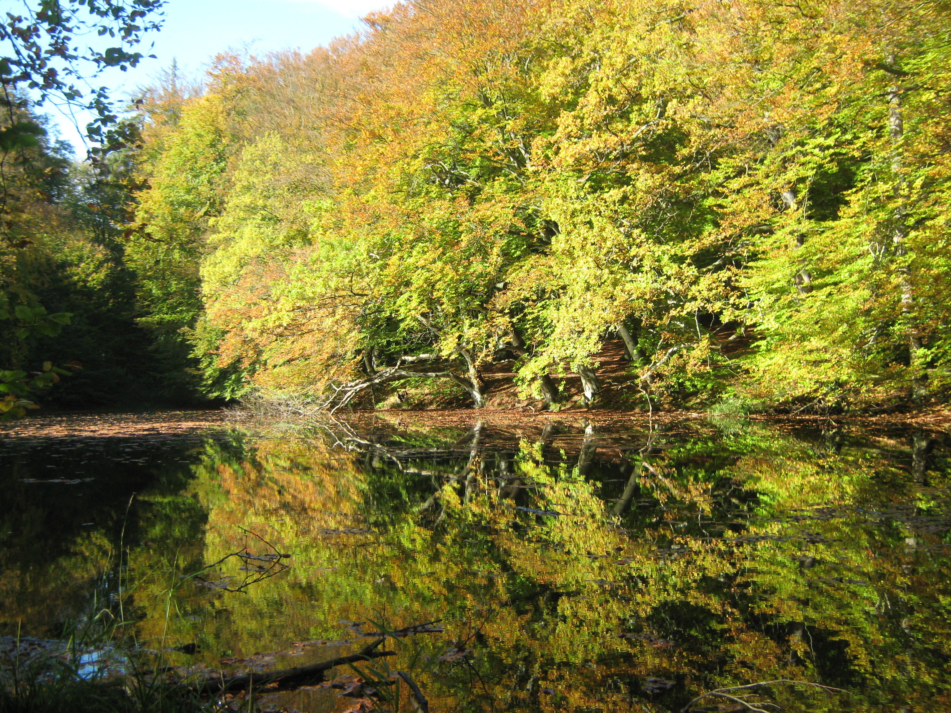 2850 Nærum, Denmark